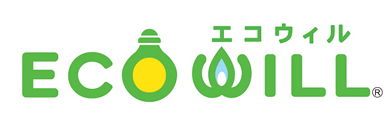 ECOWILL's logo